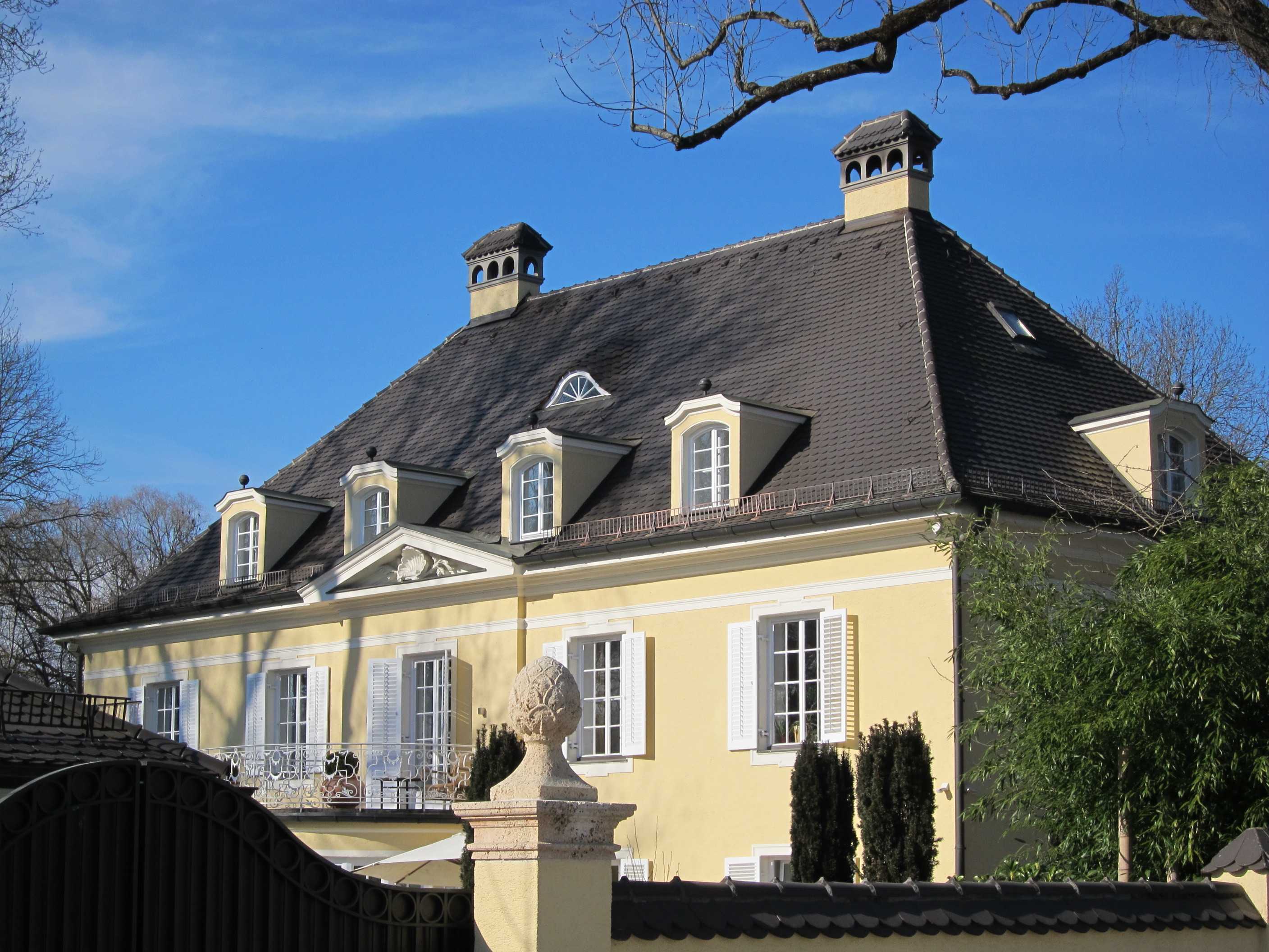 Pienzenauerstraße 53; Zweigeschossige Villa, in zurückhaltend barockisierenden Formen, 1924 von Carl Jäger; mit kleinem, umfriedetem Park.